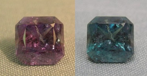 Александрит (природный Уральский камень александрит)